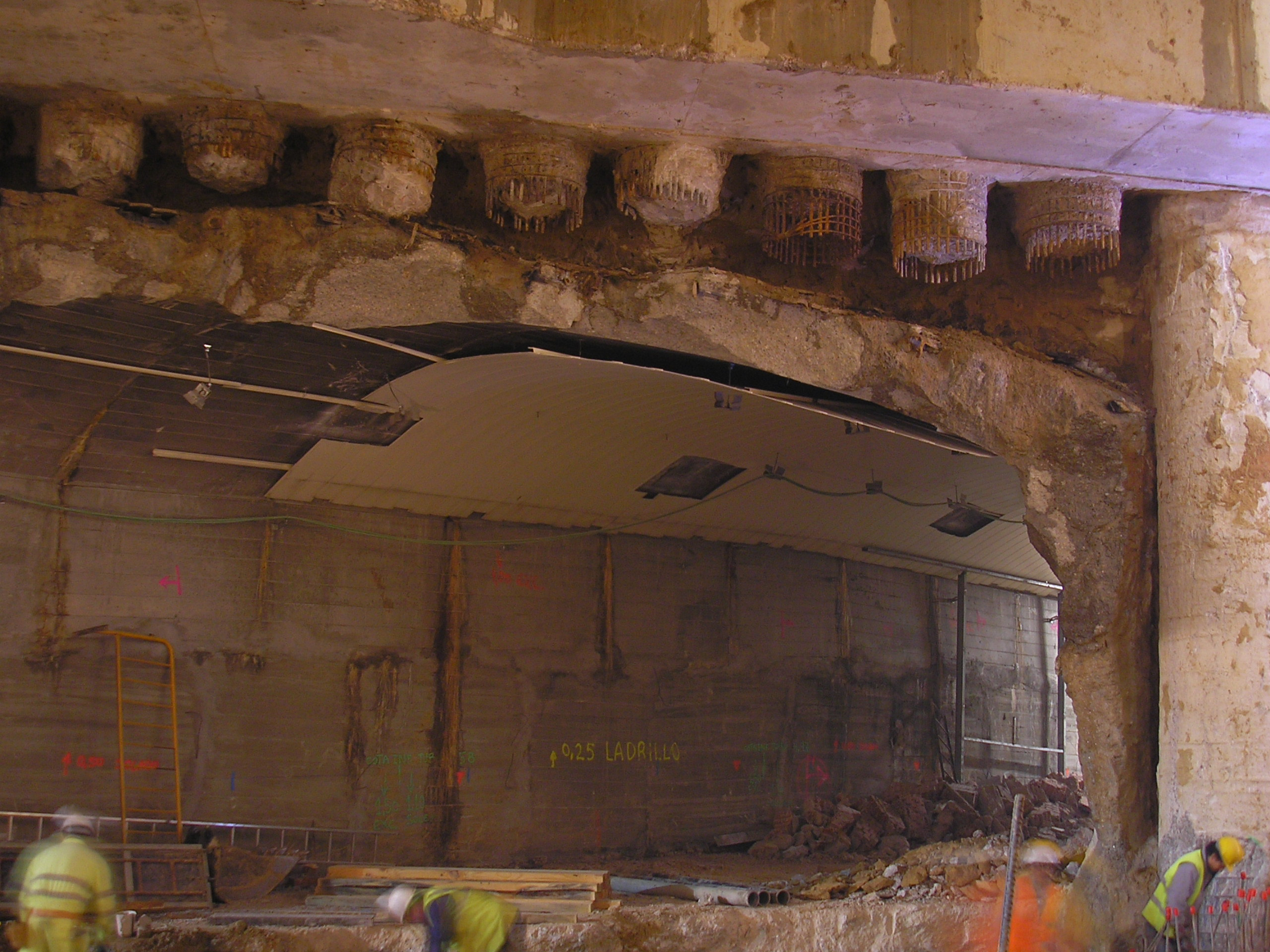 Puntas de pilotes al descubierto tras la excavación.